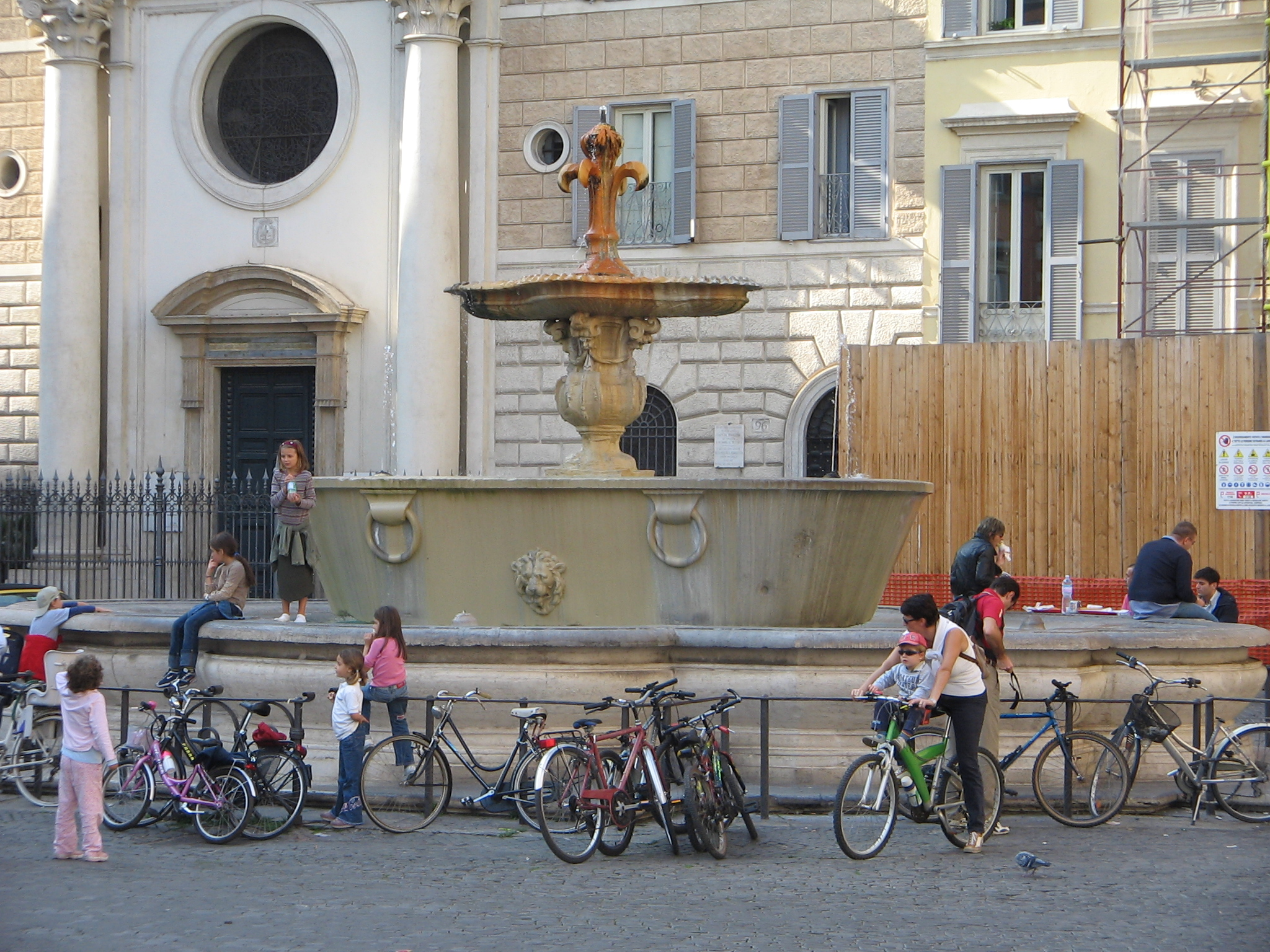 Piazza Farnese in Rome: una delle due fontane. 16/X/2005.